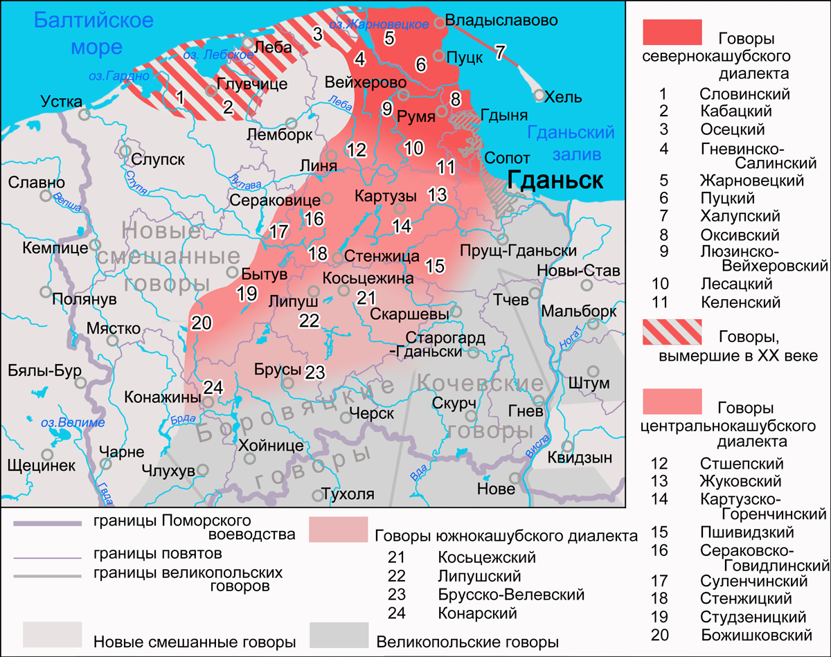 Карта кашубских диалектов и говоров. На основе данных: Historia, geografia, język i piśmiennictwo Kaszubów (fragment) - карта размещения кашубских говоров и диалектов Фридриха Лоренца Dialekty kaszubskie wg F. Lorentza - карта размещения кашубских говоров и диалектов Фридриха Лоренца Gwary polskie. Przewodnik multimedialny pod redakcją Haliny Karaś. Ugrupowania dialektów i gwar polskich - кашубский на карте диалектов польского языка